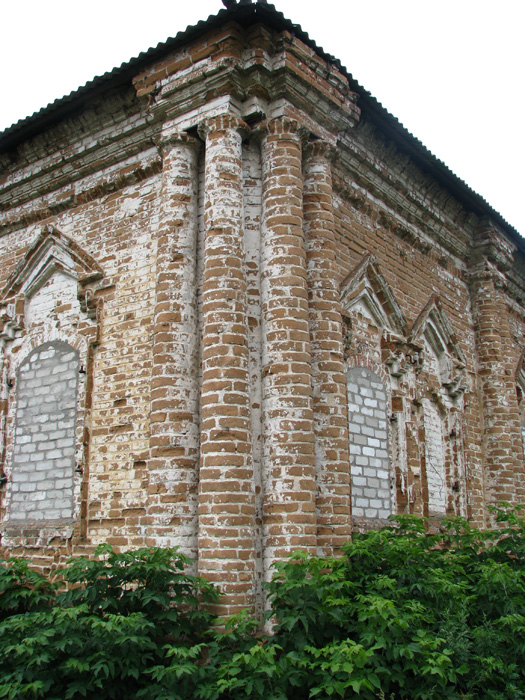 Мазепины палаты